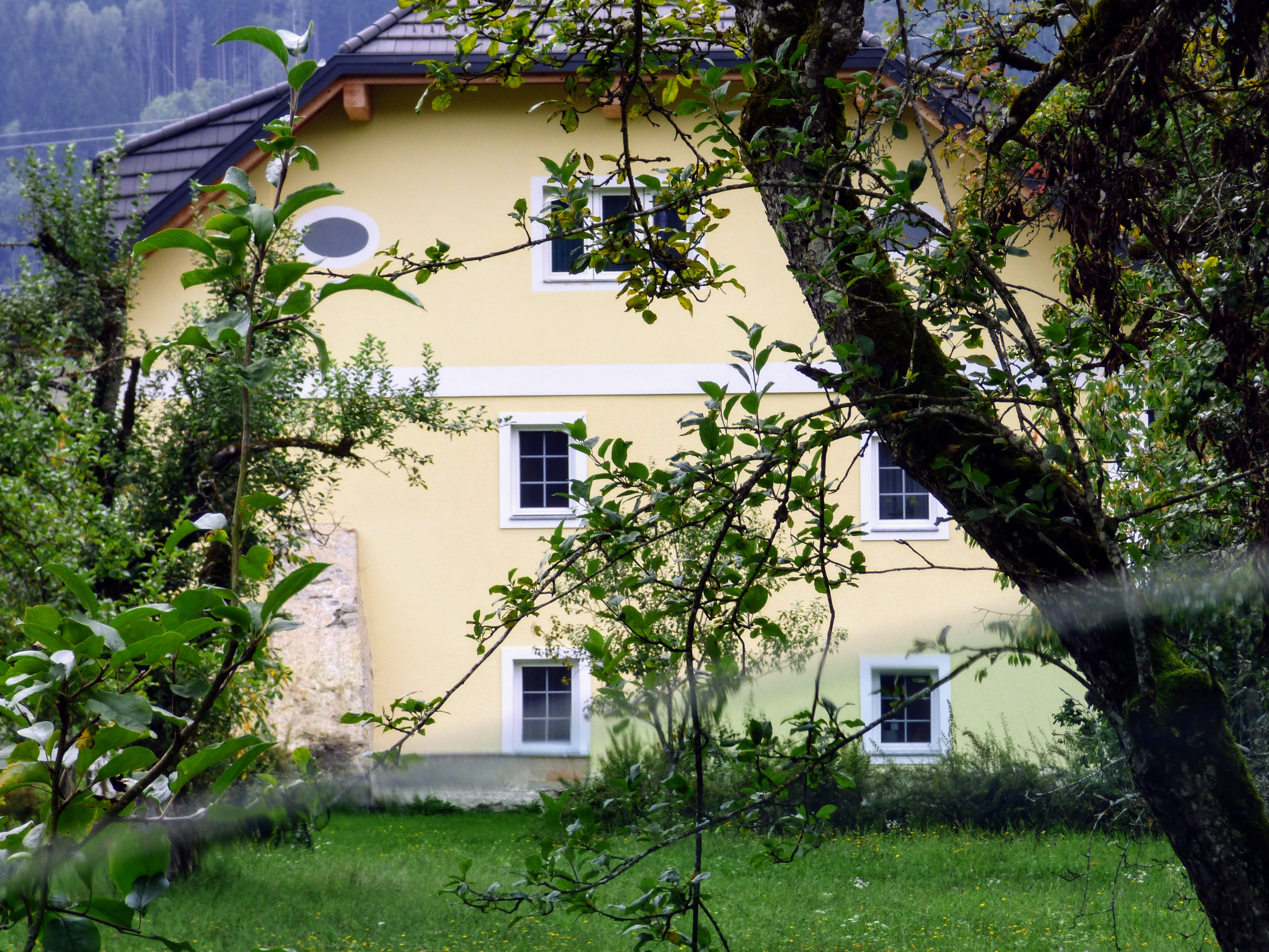 Lorberhof (Gemeinde Liebenfels), Haus Nr. 1, ehemaliger Gutshof